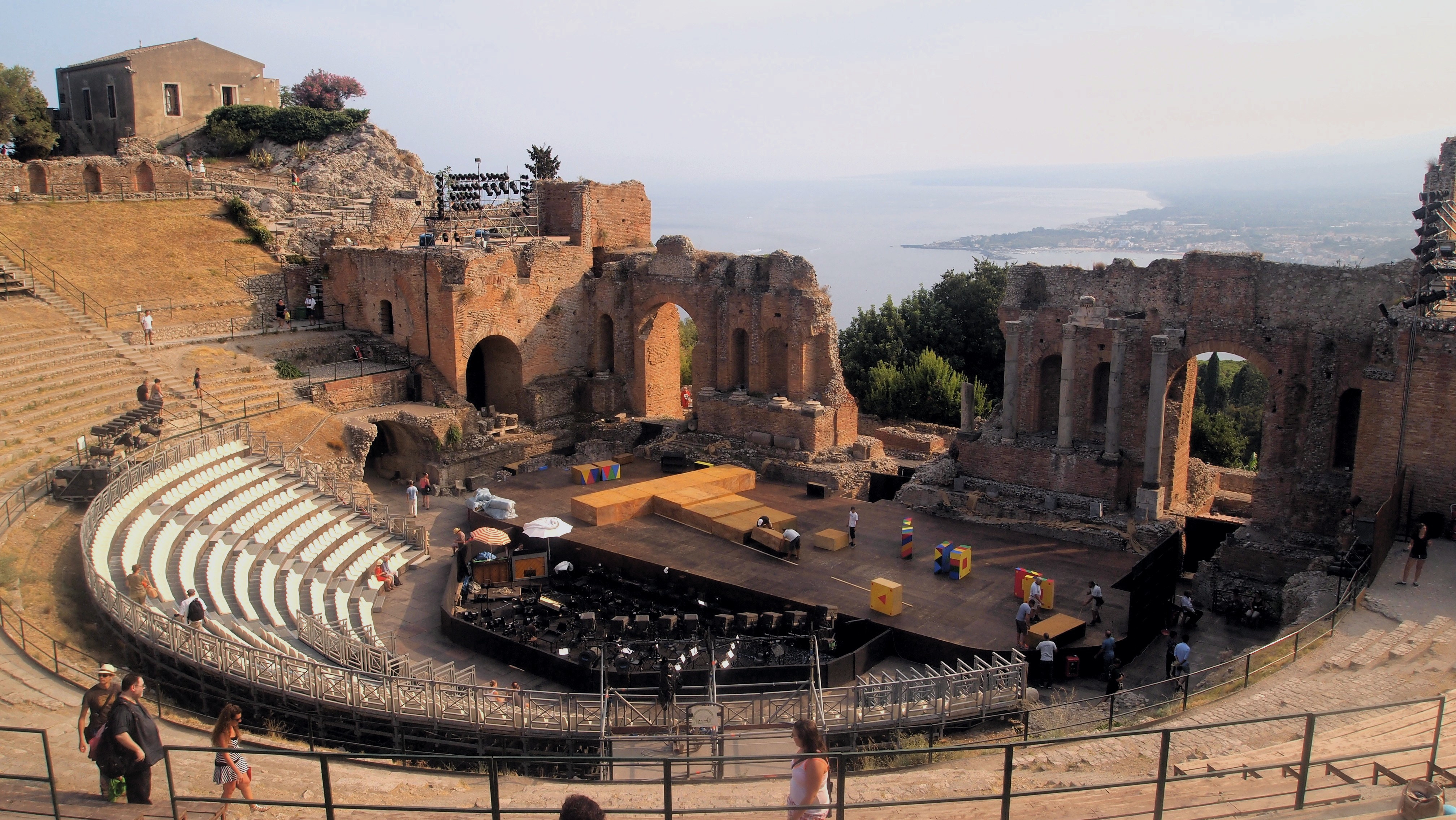 Il teatro antico con vista di Taormina